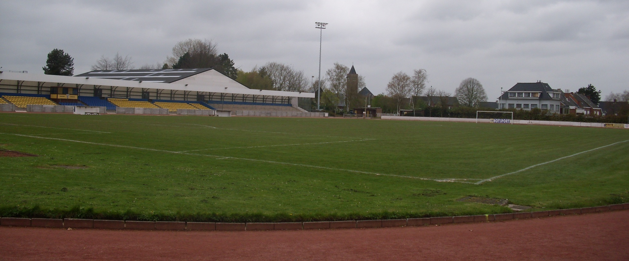 Stedelijk Sportstadion "Jules Matthijs" - stadion van KSV Sottegem - Kastanjelaan 85 - Zottegem - Oost-Vlaanderen - België. In het midden de kerk van Bevegem.